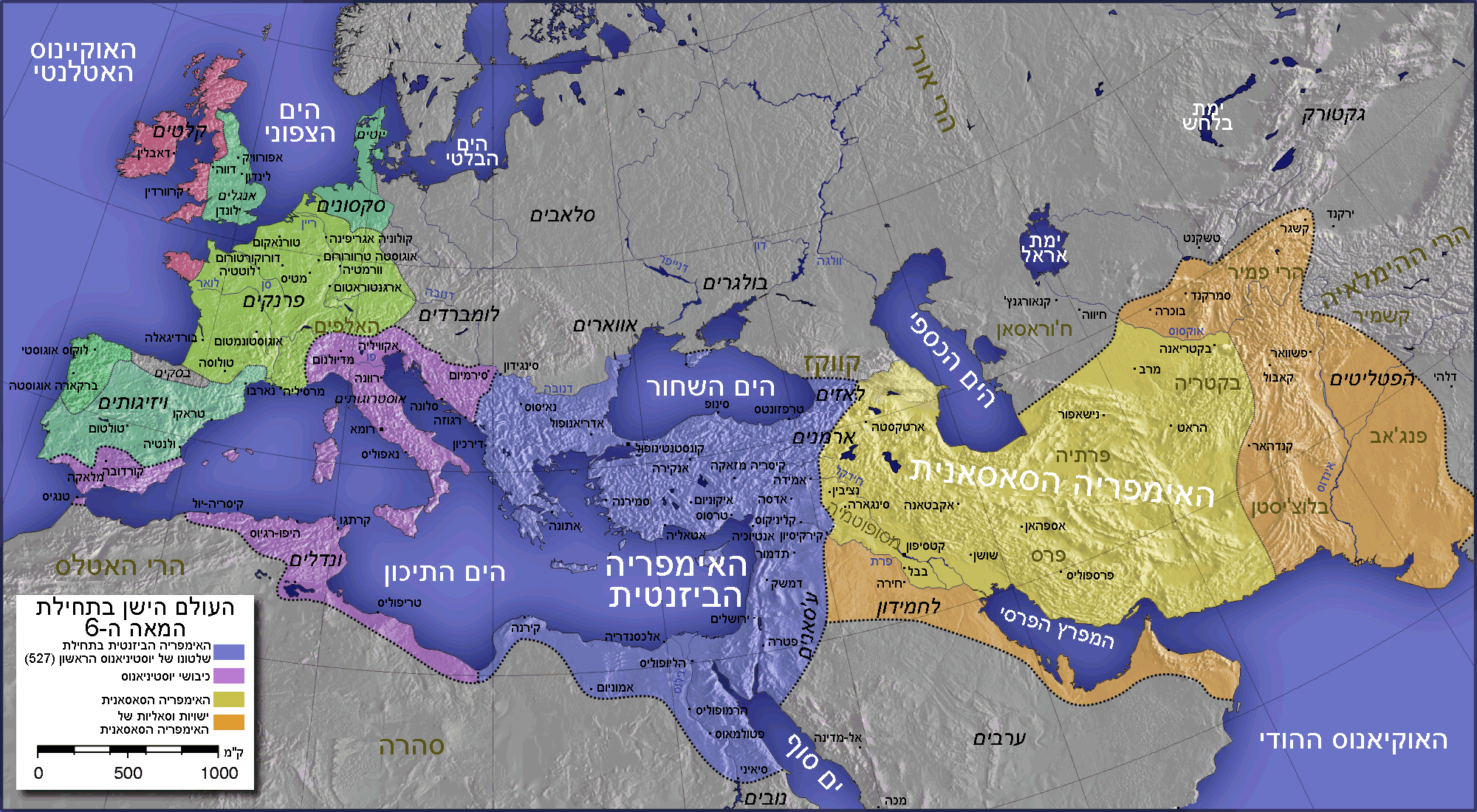 Justinian Byzanz